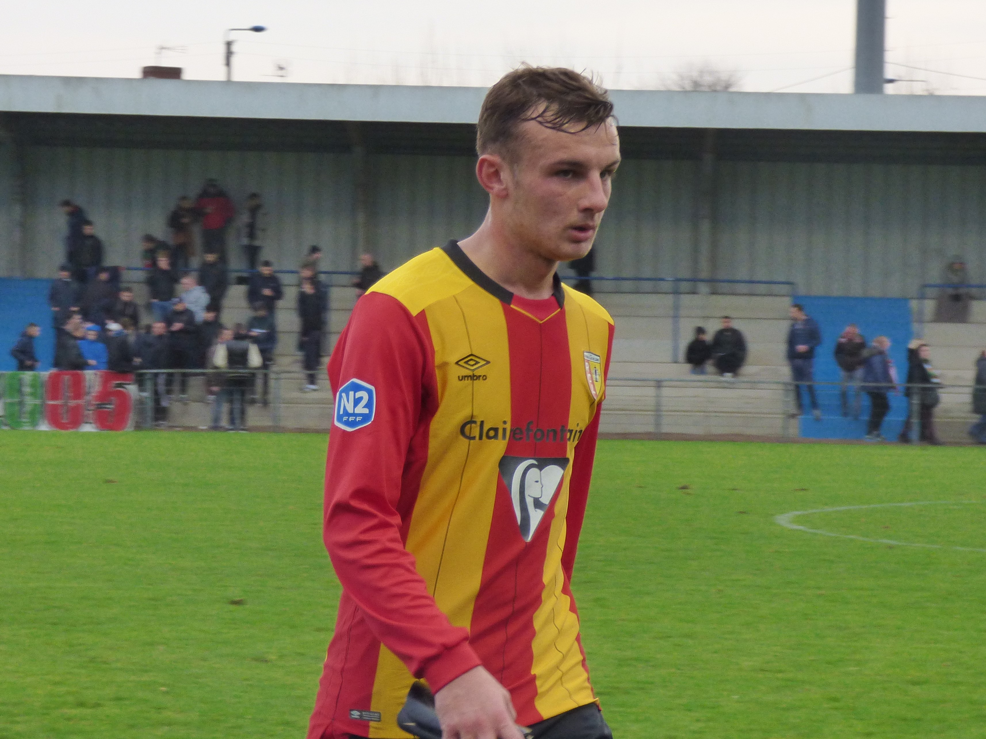 Guillaume Beghin lors du match Lens B / Sedan, comptant pour la quatorzième journée du Championnat de France de football de National 2 (4ème division française) 2017-2018 au Stade François-Blin d'Avion le 27 janvier 2018.